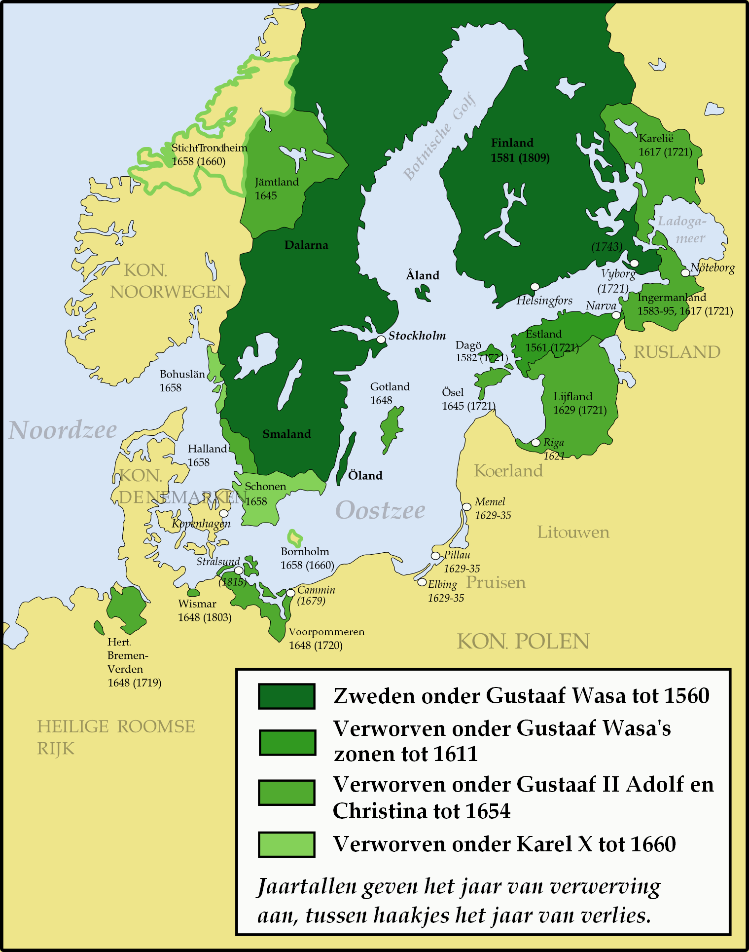 Ontwikkeling van Zweedse rijk (1560-1814). Nederlandstalige versie van Ortus-imperii-suecorum.png (oorspronkelijk in het Duits).